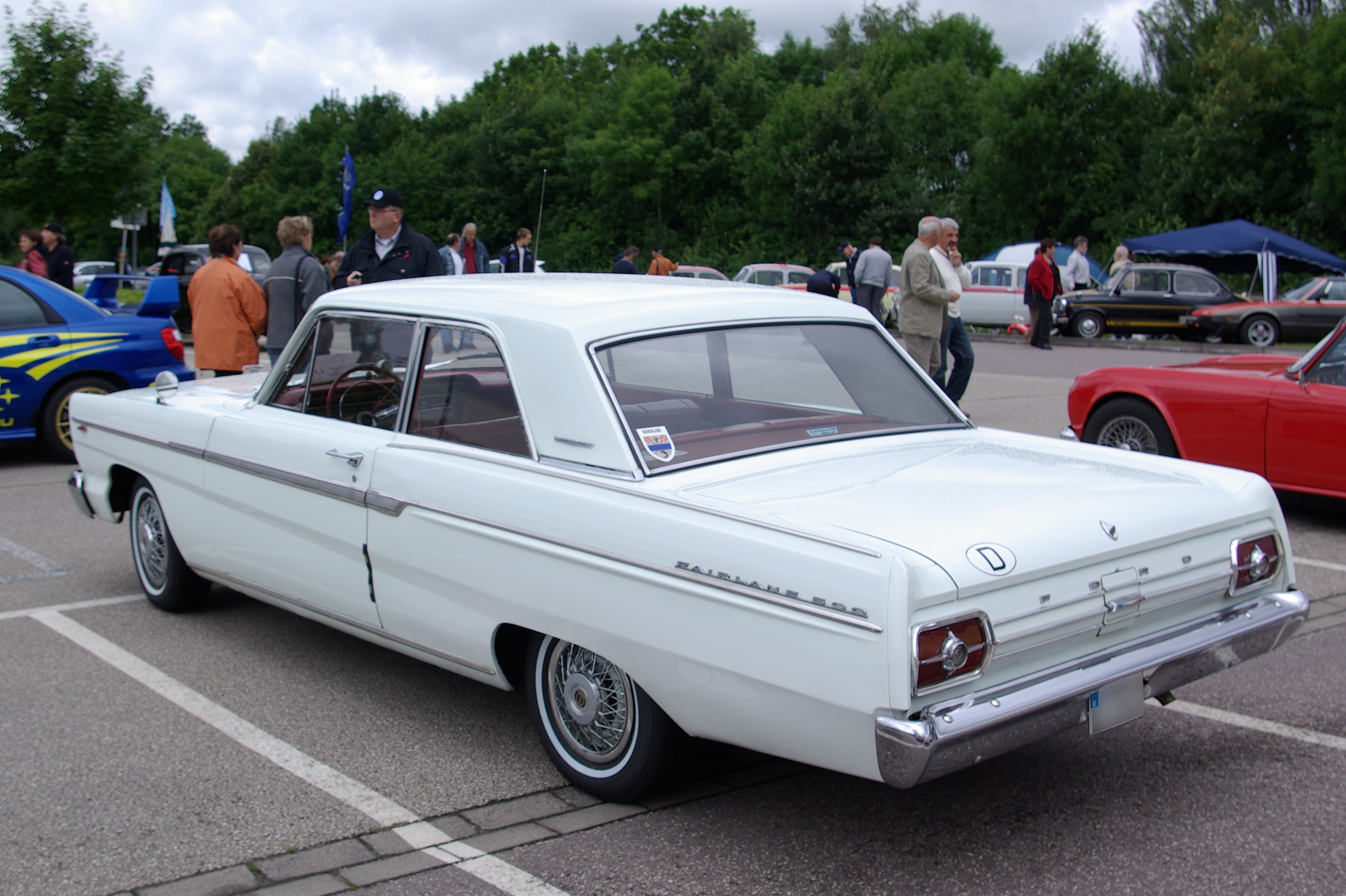 Ford Fairlane 500, Baujahr 1965, 105 PS aufgenommen bei / photographed at "Internationales Konzer Oldtimer-Treffen" am 19. Juli 2009